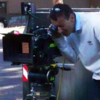 Foto di set